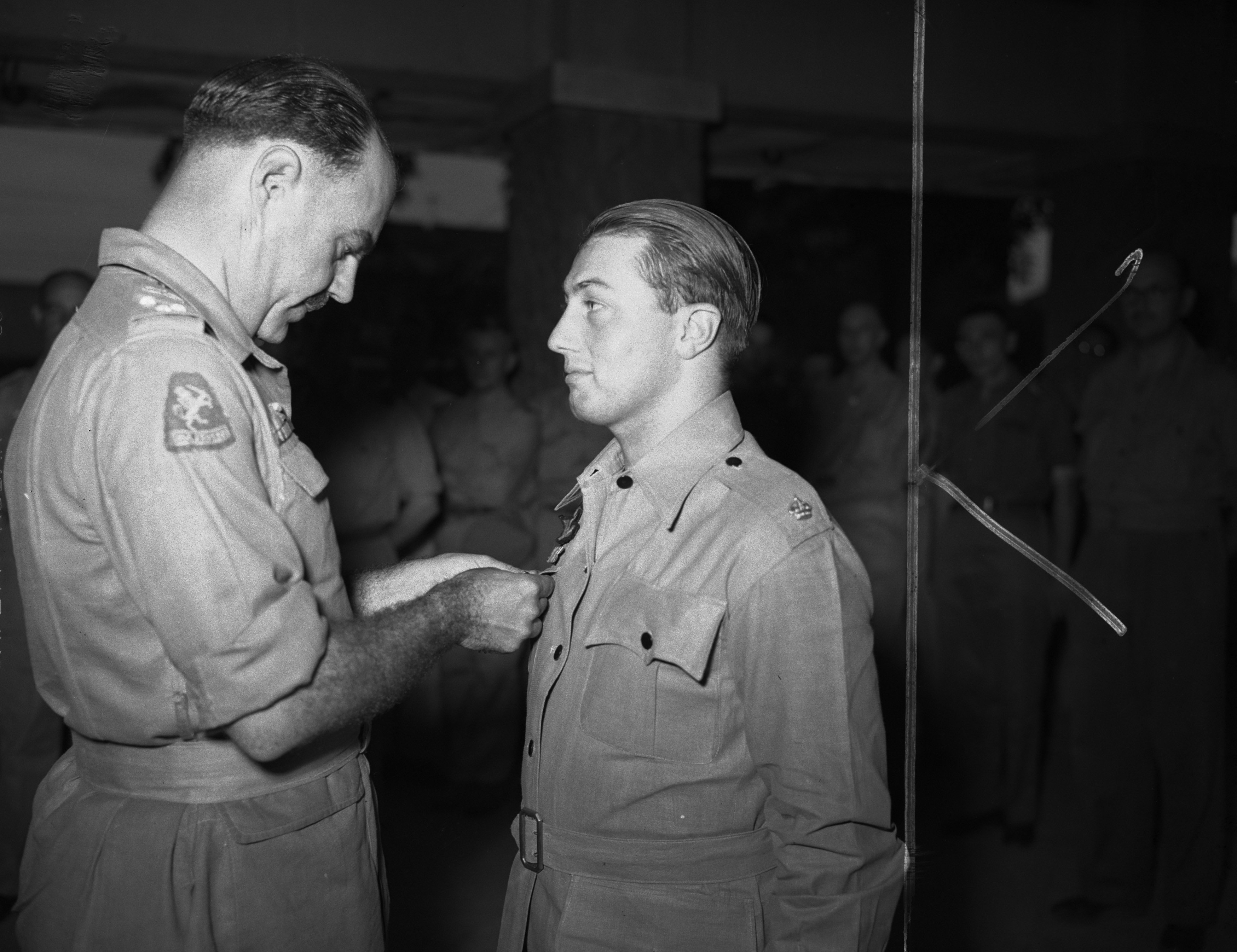 Collectie / Archief : Fotocollectie Dienst voor Legercontacten Indonesië Reportage / Serie : [DLC] Decoratie majoor Druce Beschrijving : In aanwezigheid van verschillende autoriteiten, w.o. luitenant-generaal Spoor, generaal-majoor Buurman van Vreeden, generaal-majoor Kengen, generaal-majoor Doorman en overste Jungschlager, hoofd van de Nefis, werd door kolonel mr. Van Houten op feestelijke wijze het Officierskruis in de Oranje-Nassau-Orde met de zwaarden uitgereikt aan Major H. C. Druce, D.S.O. with Bar en M.C. Tijdens de oorlog was de gedecoreerde belast met de organisatie van de spionage in Nederland. Kolonel van Houten speldt de versierselen op bij majoor Bruce Annotatie : . "Het dagblad : uitgave van de Nederlandsche Dagbladpers te Batavia". Batavia, 07-10-1946. Geraadpleegd op Delpher op 26-03-2016, Druce was agent van MI6 in Indonesië Datum : 7 oktober 1946 Locatie : Batavia, Indonesië, Jakarta, Nederlands-Indië Fotograaf : Fotograaf Onbekend / DLC Auteursrechthebbende : Nationaal Archief Materiaalsoort : Negatief (zwart/wit) Nummer archiefinventaris : bekijk toegang 2.24.04.02 Bestanddeelnummer : 8535